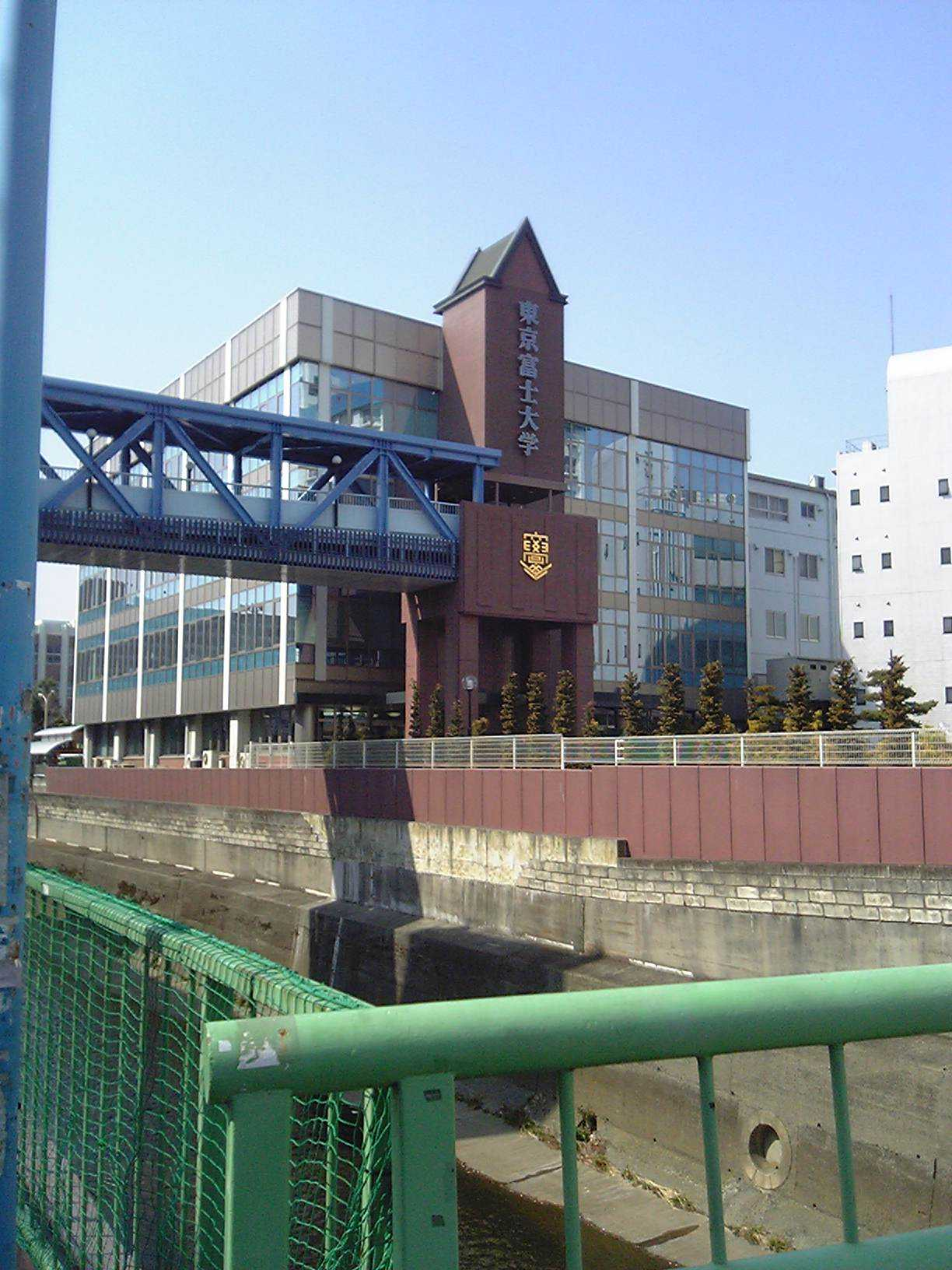 東京富士大学